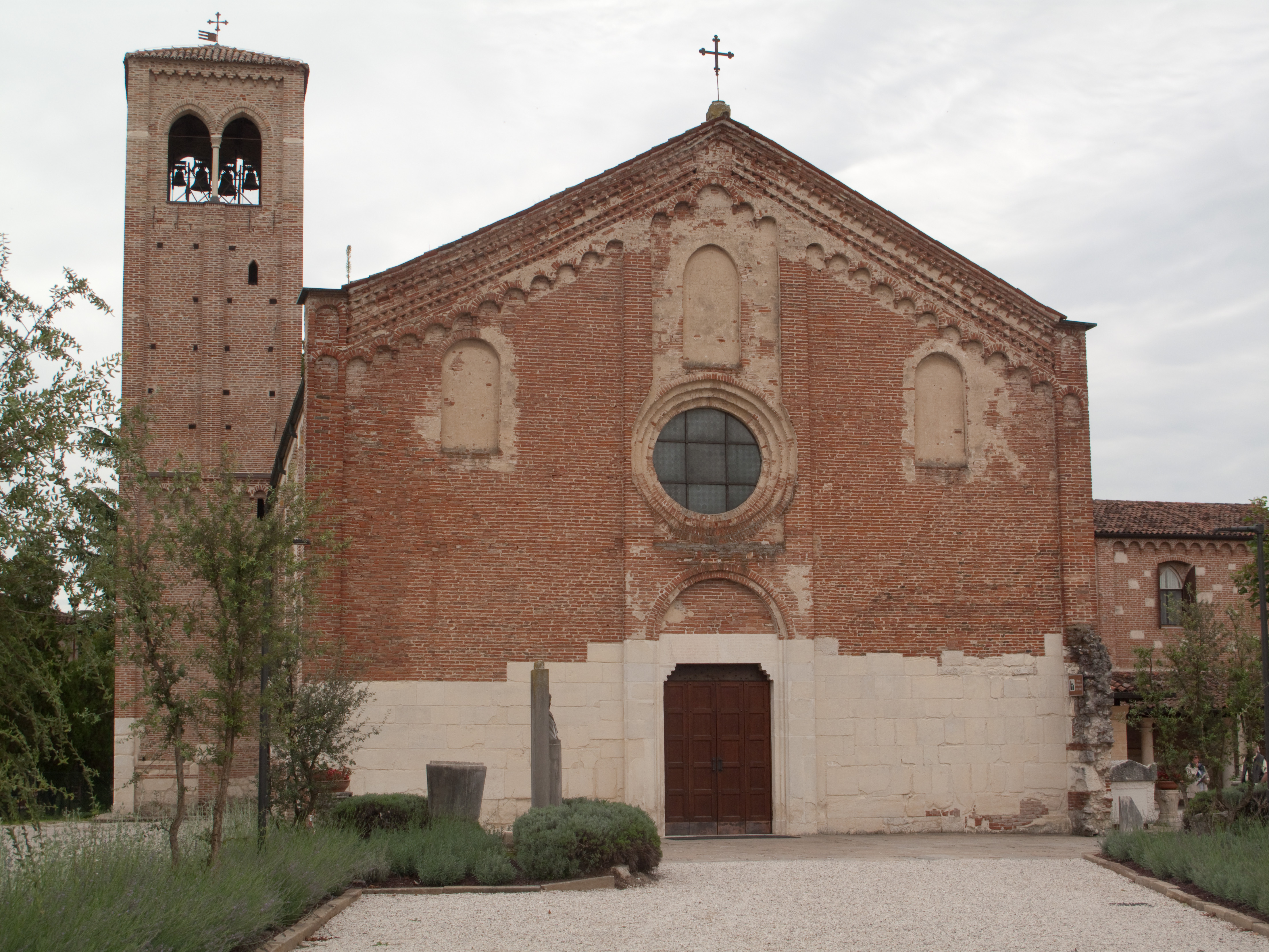 Facciata